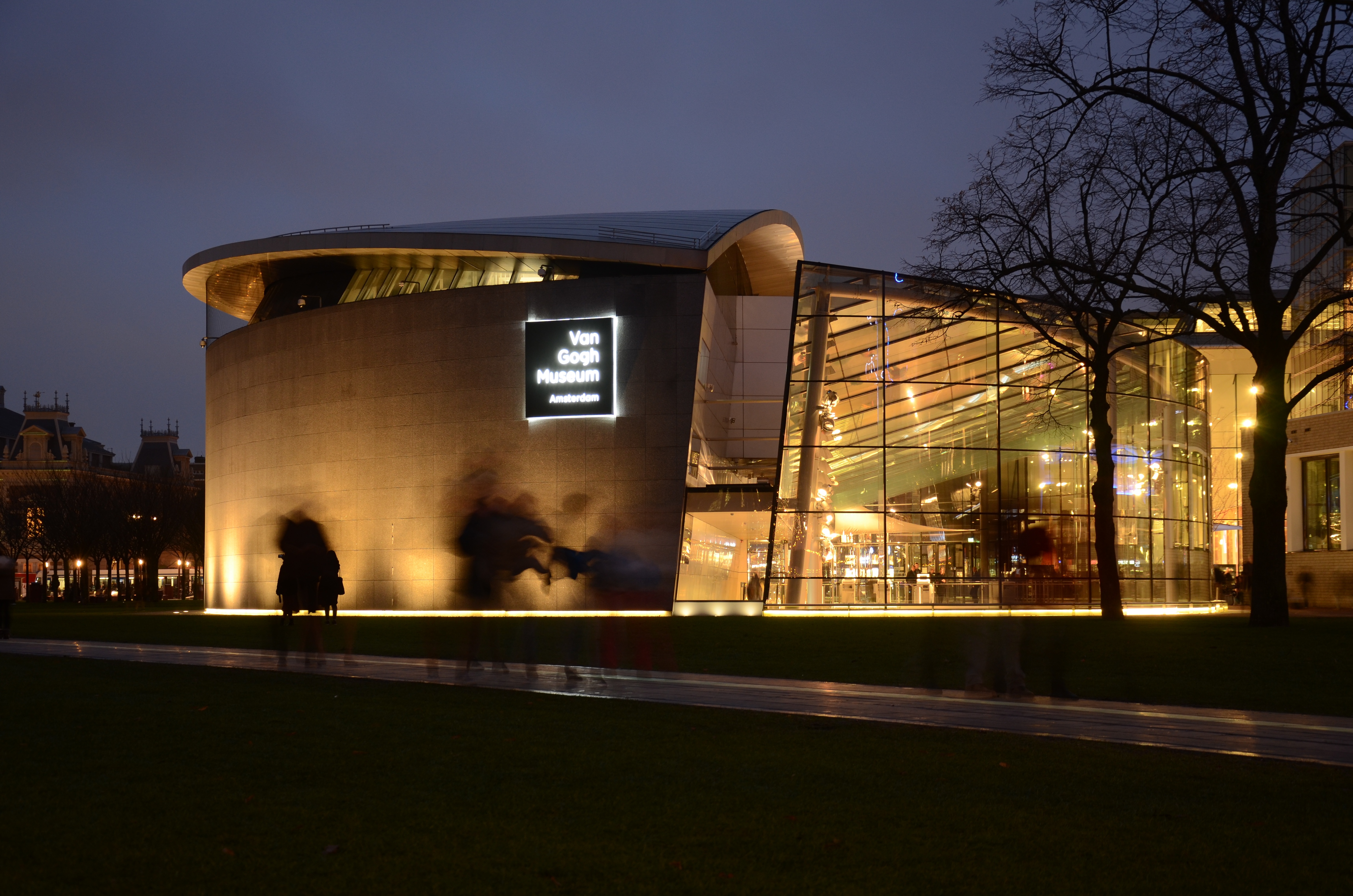 Het Van Gogh Museum 's nachts.